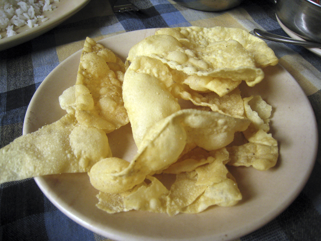 Papads